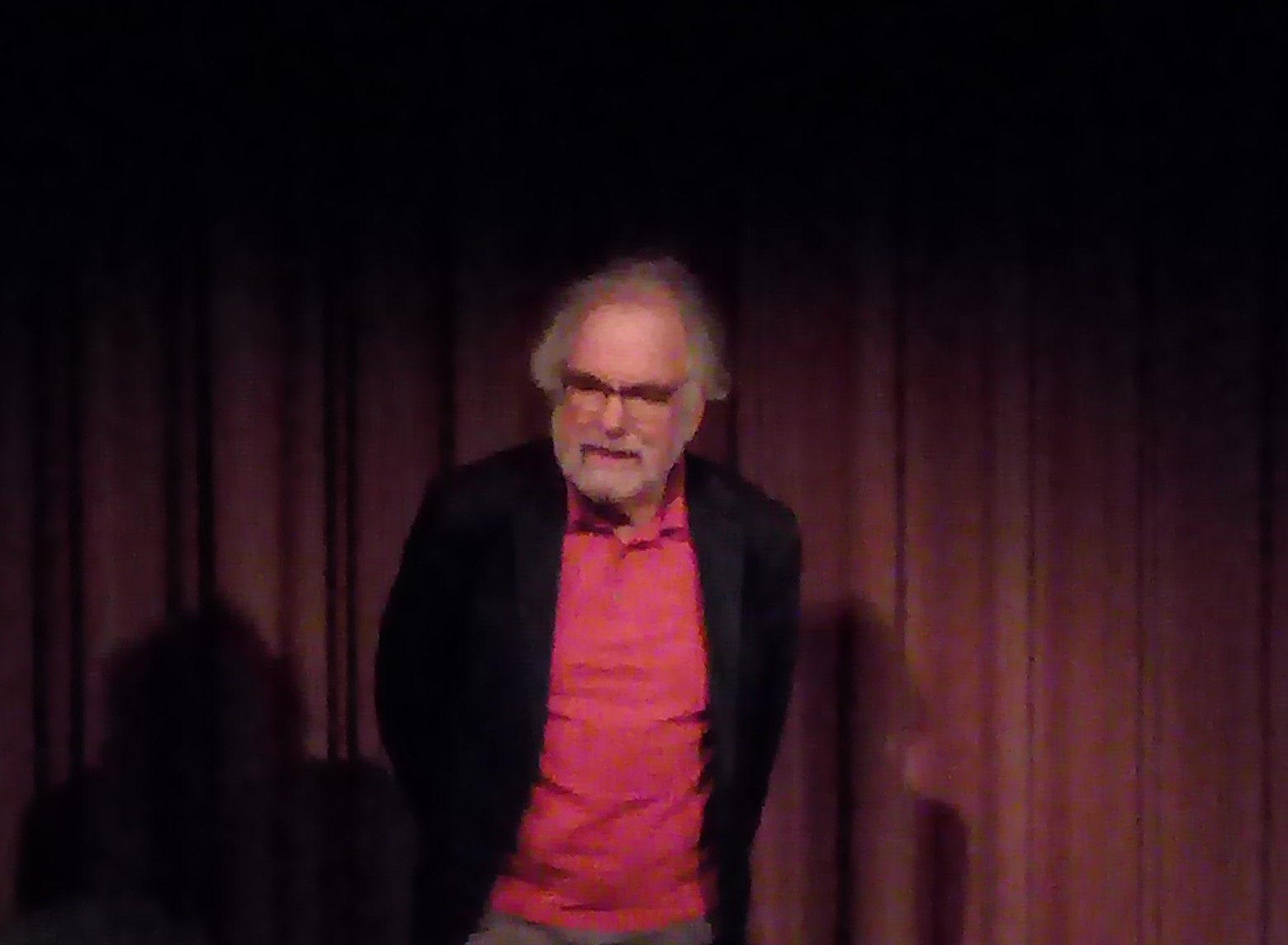 Regisseur Peter Fleischmann 2019